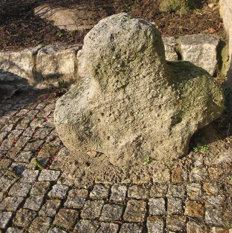 Przykościelny krzyż pokutny (dziedziniec kościoła w Ochli) fot: Mohylek